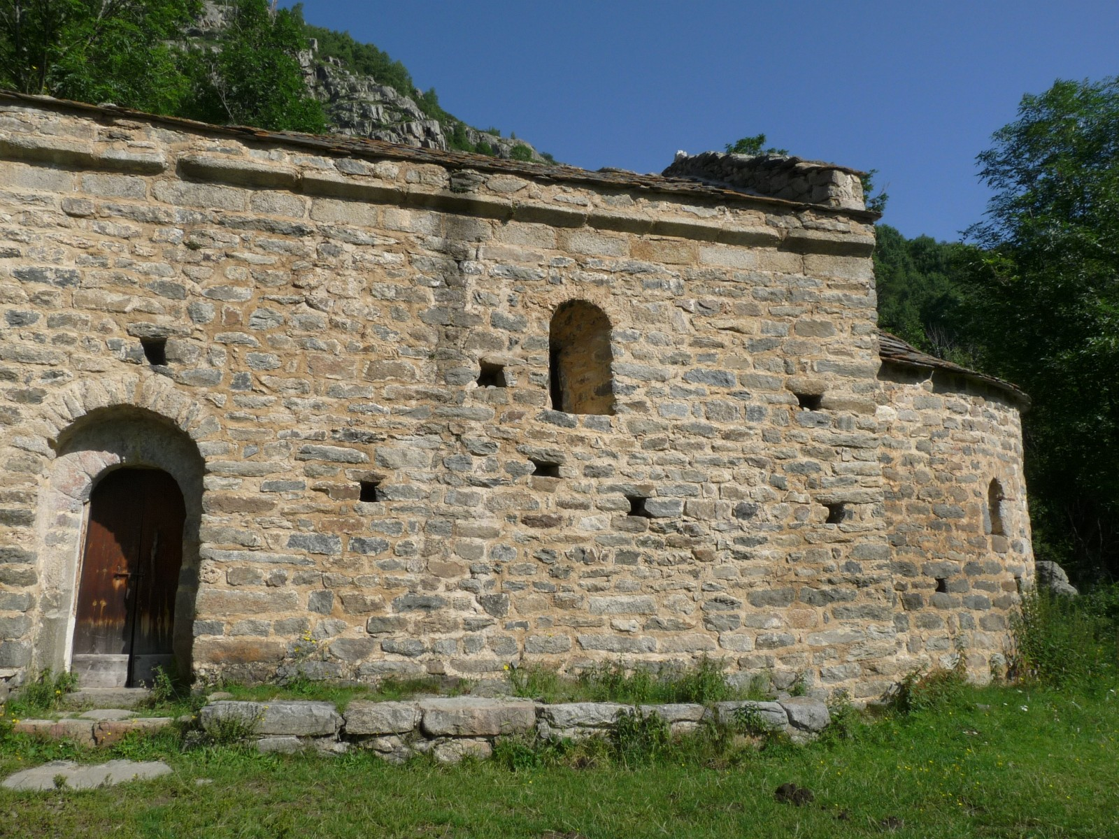 Chapelle St-Martin d'Envalls, Pyrénées-Orientales, France